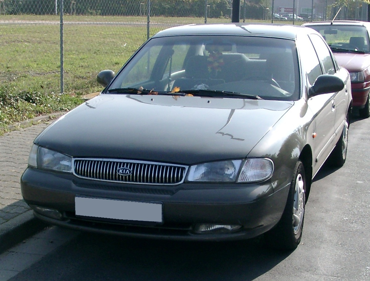 Kia Clarus